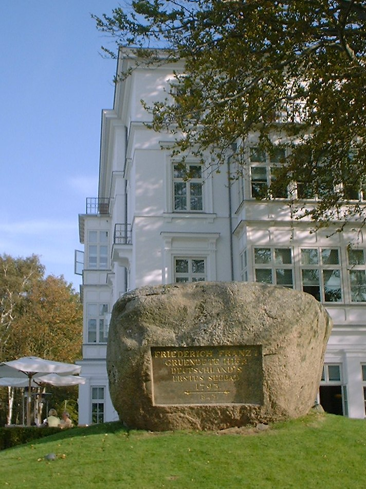 Gedenkstein für Friedrich Franz I. in Heiligendamm Quelle: selbst fotografiert Fotograf/Zeichner: Doris Antony, Berlin Datum der Aufnahme: 17.09.2003 Lizenzstatus: Doris Antony put it under the GFDL and CC-BY-SA-2.5 from de.wikipedia [1] 18:15, 7. Mär 2005 . . DorisAntony (Diskussion) . . 712 x 950 (188094 Byte) (Gedenkstein)